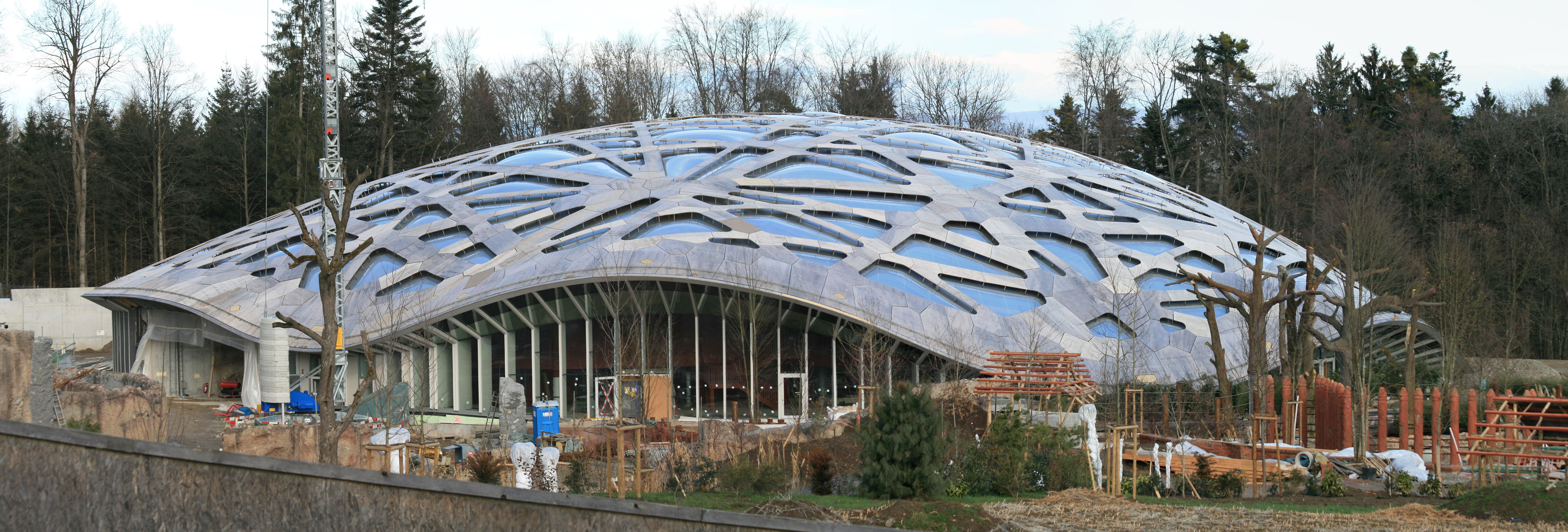 Neues Elefantenhaus im ZüriZoo